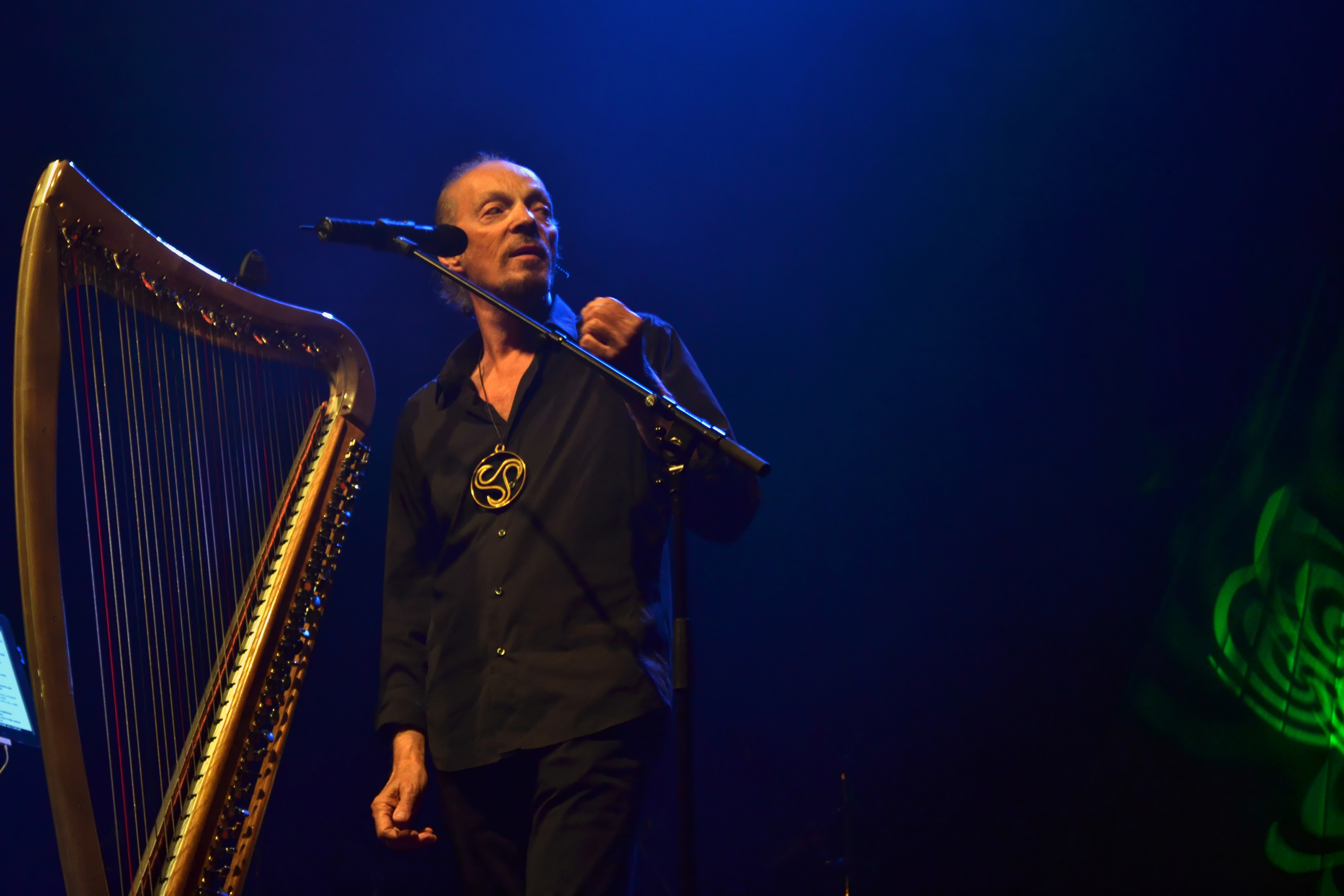 Alan Stivell en concert gratuit lors des Jeudis du port à Brest le 15 août 2013.